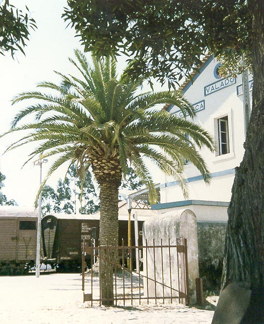 Phoenix canariensis in Valado dos Frades (Portugal)